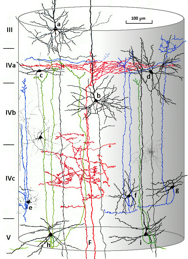 Corteza visual del mono (Macaca rhesus). Representación de una columna cortical. Células piramidales a, b. Células estrelladas con espinas c, d. Células estrelladas de axon recurrente e, f, g. Células piramidales de axon recurrente h, i. Fibras sensoriales aferentes en rojo F. Dibujo de una preparación teñida por el método de Golgi.